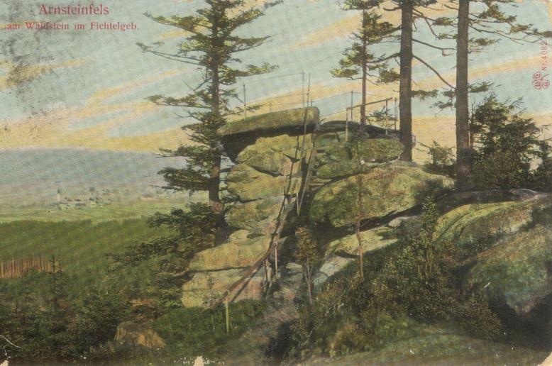 Arnsteinfelsen auf dem Großen Waldstein in Richtung Zell